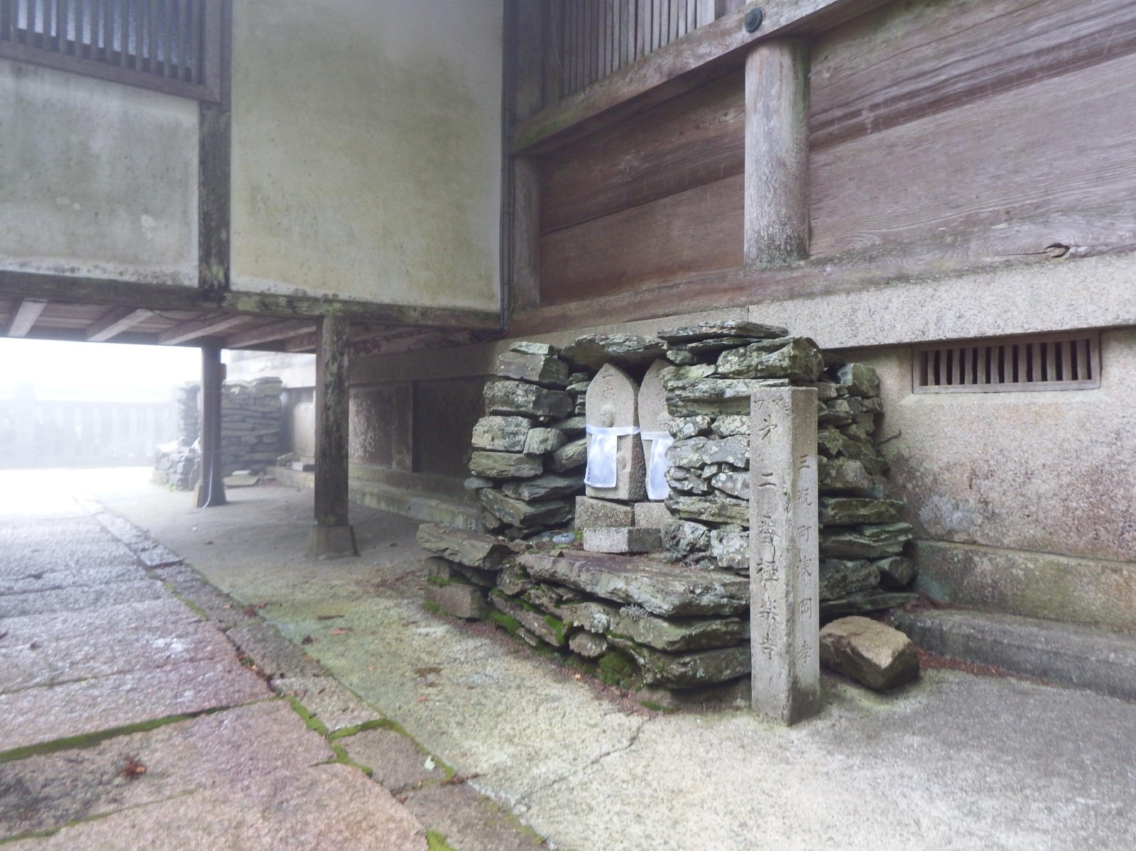 金山出石寺の本四国の写し